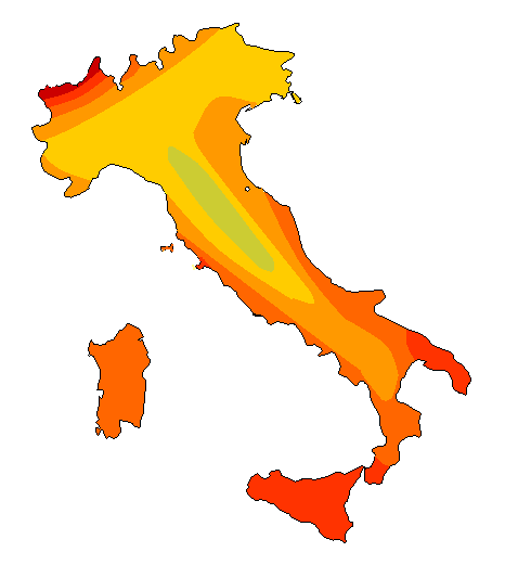 Carta della radiazione solare globale in Italia in maggio 26 MJ/mq